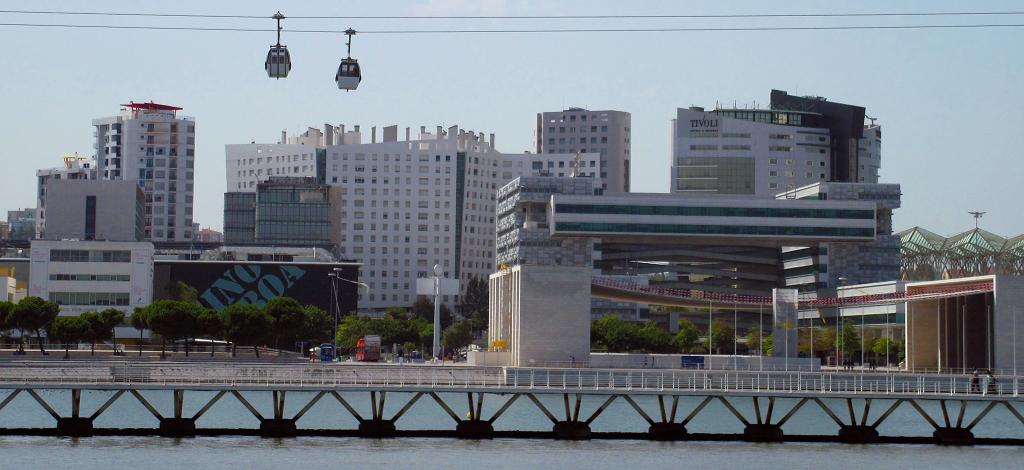 Mini Cruise on Tagus